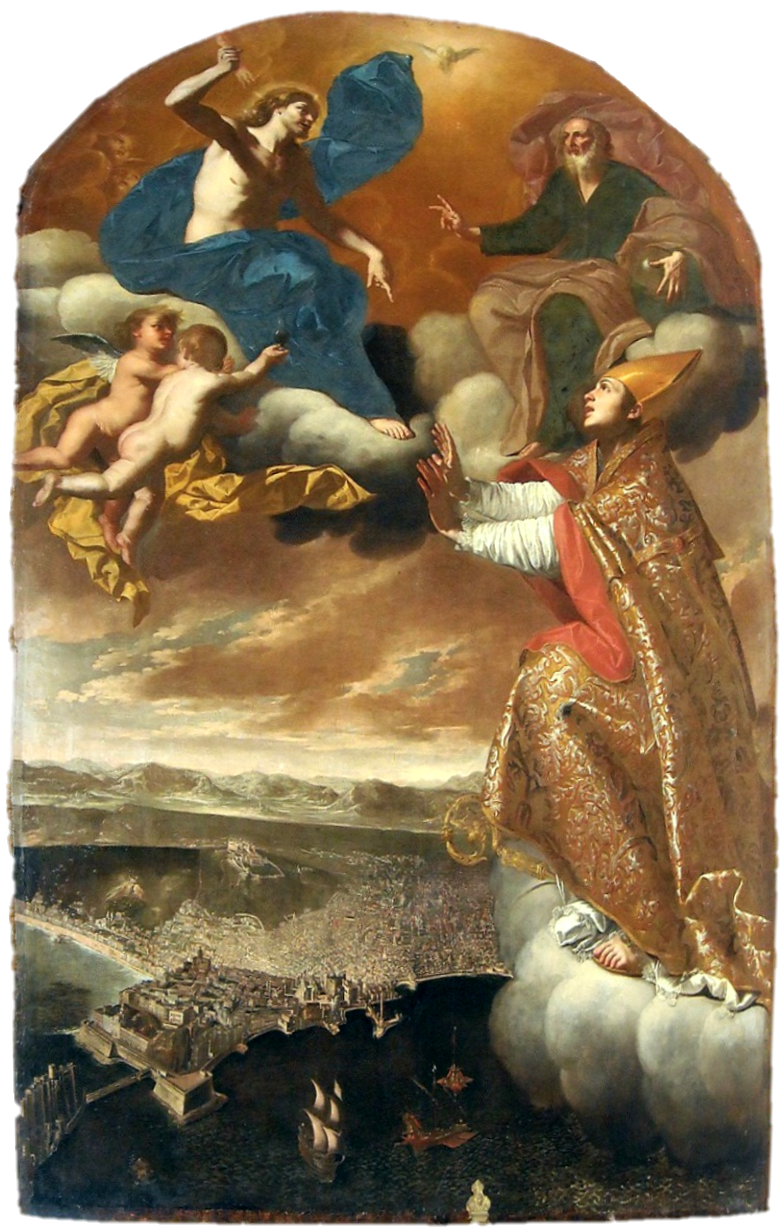 San Gennaro che intercede presso la Trinità per la città di Napoli